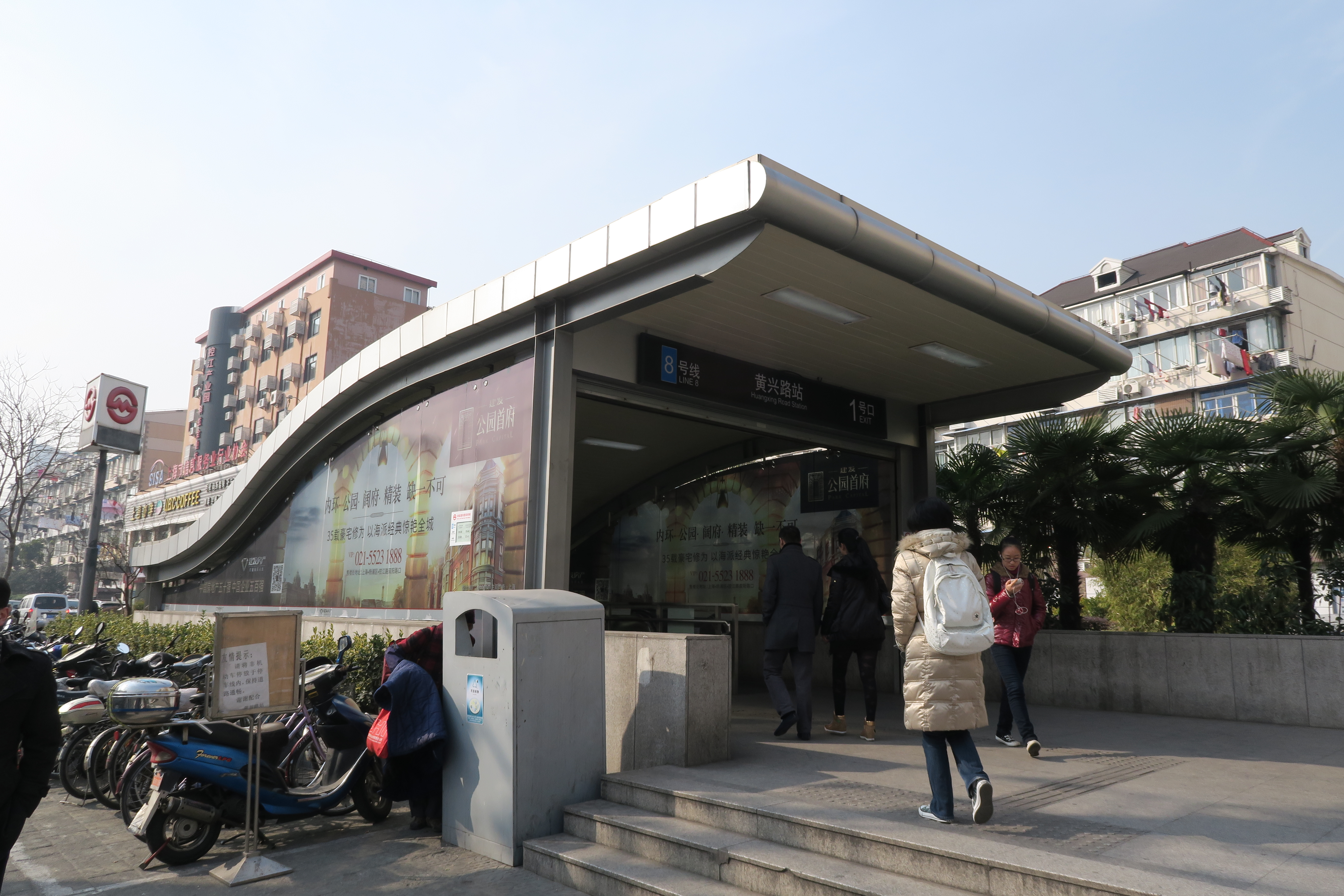 8号线黄兴路站